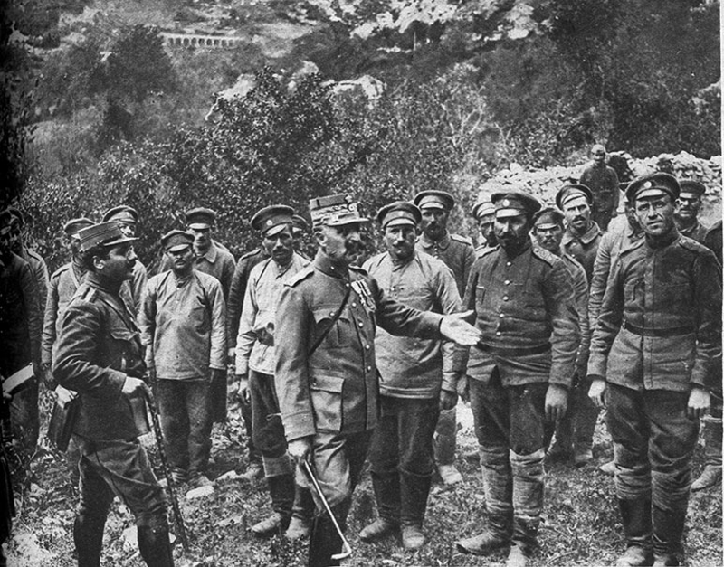 Ο Συνταγματάρχης Νικόλας Χριστοδούλου μαζί με αιχμάλωτους Βούλγαρους στρατιώτες